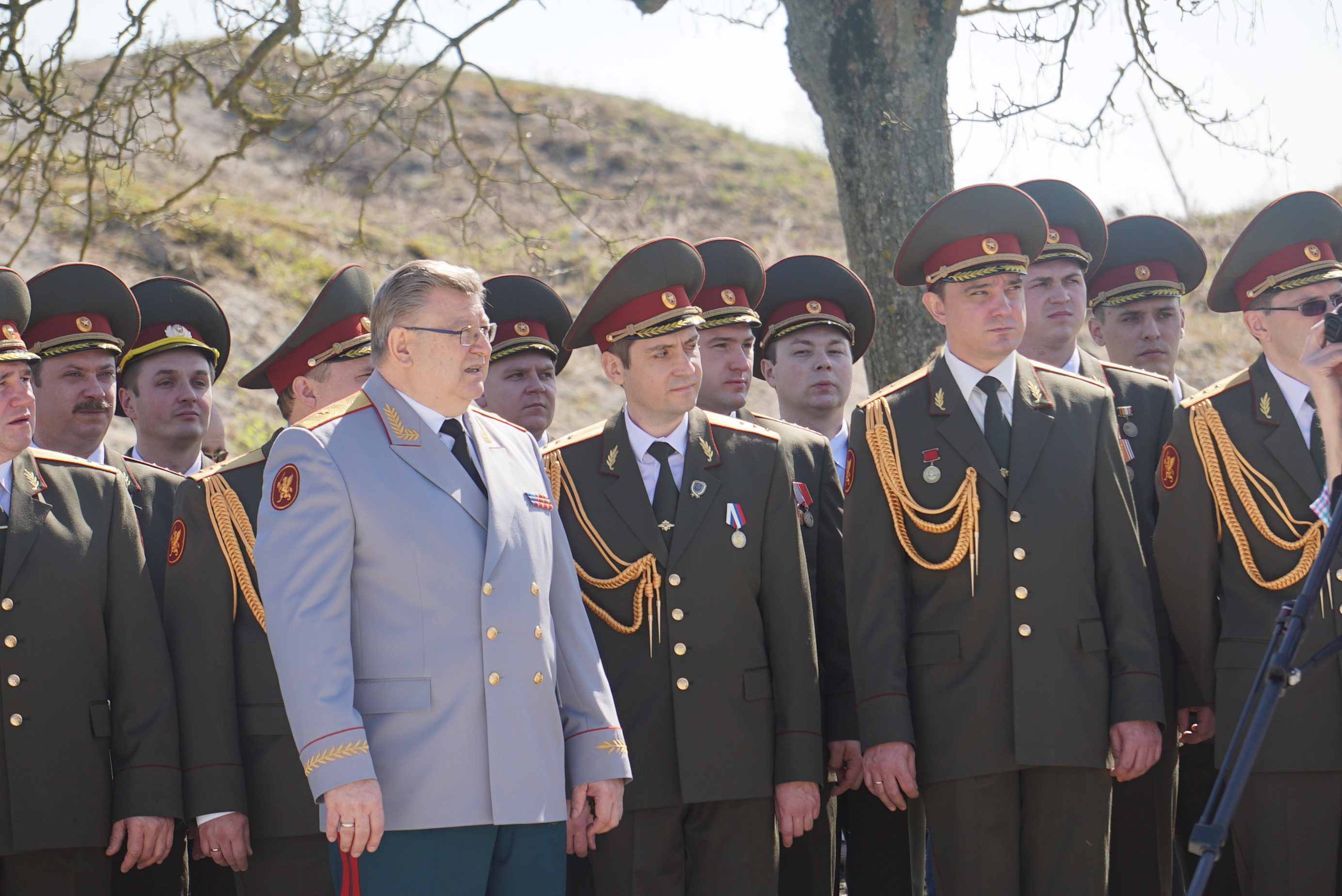 lors des journées de l'histoire au fort de la pompelle. Gennady Ksenafontovich Sachenyuk dirigeant la chorale ?